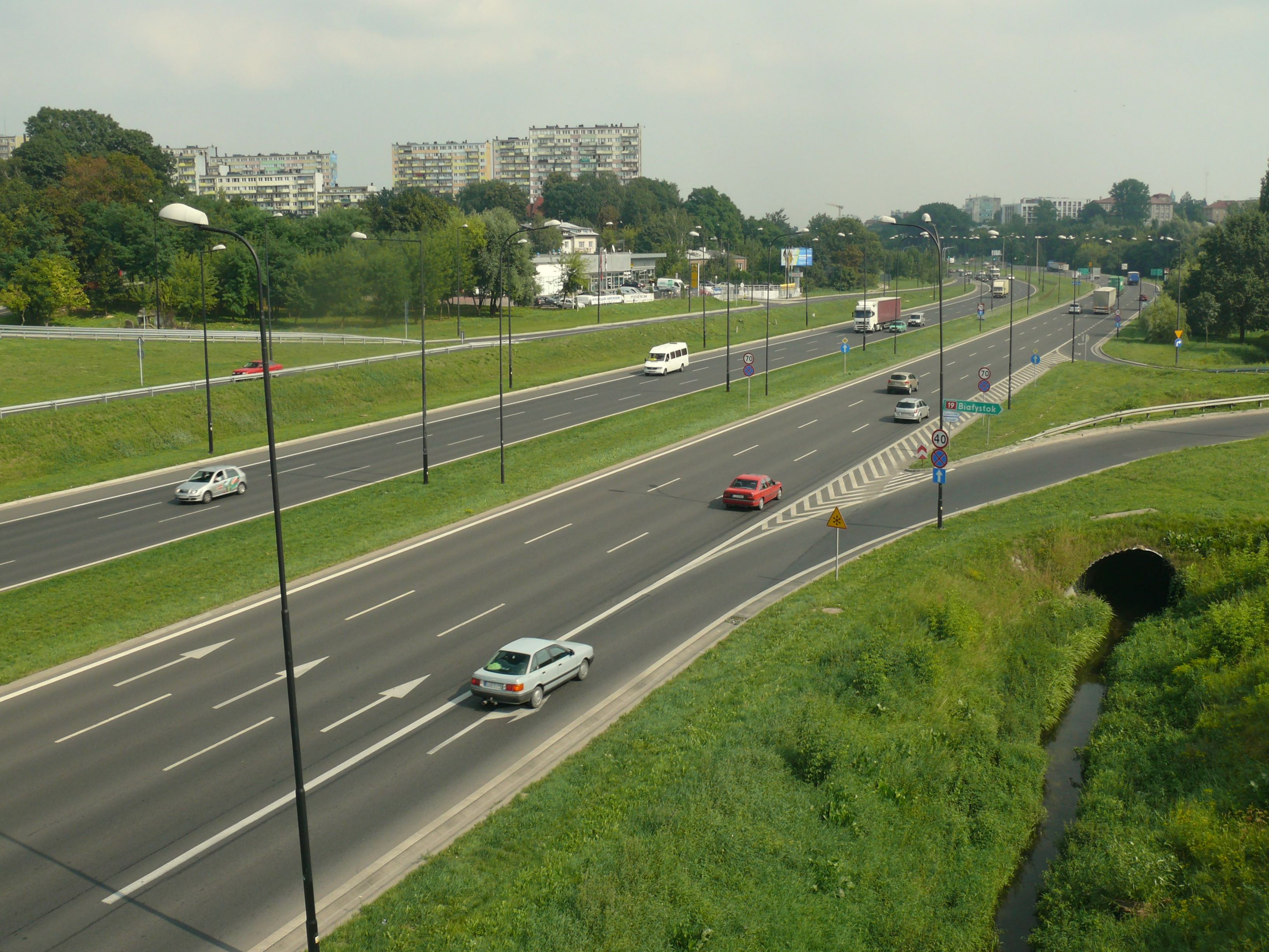 Aleja Solidarności w Lublinie, widok z wiaduktu Poniatowskiego.